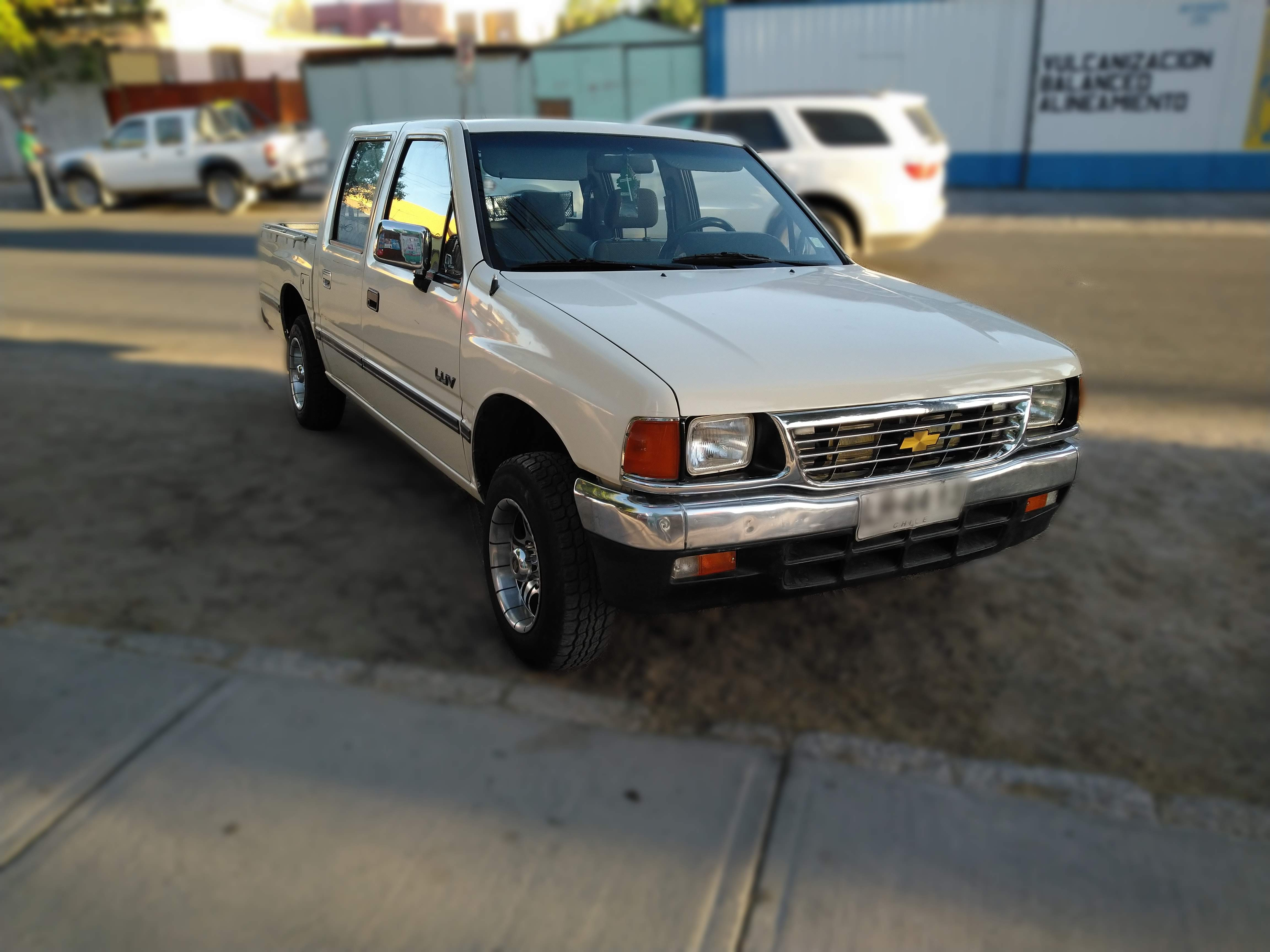 fotografiada en Calama chile